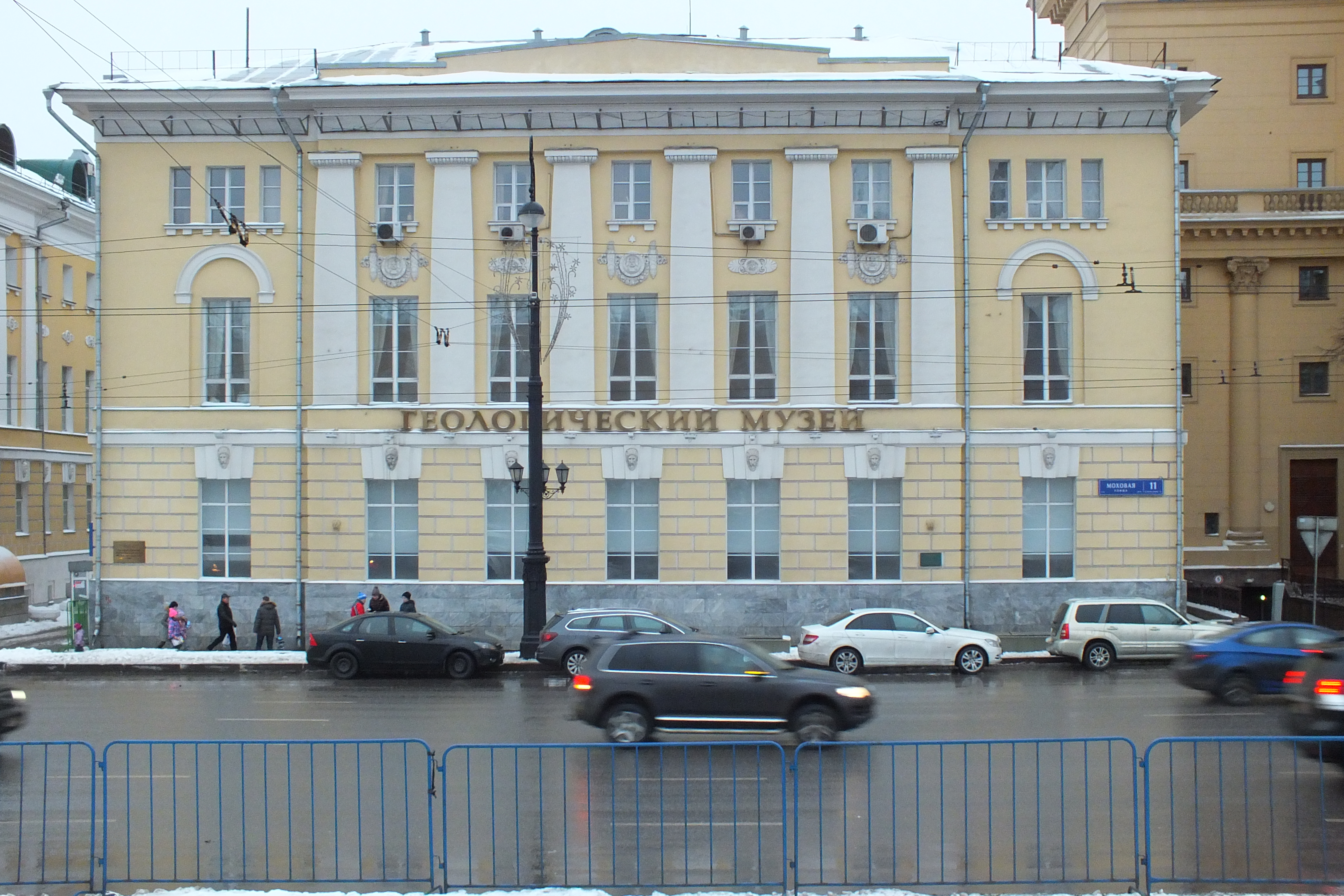 Государственный геологический музей им. В. И. Вернадского РАН (Моховая улица, дом 11), вид с другой стороны Моховой улицы.